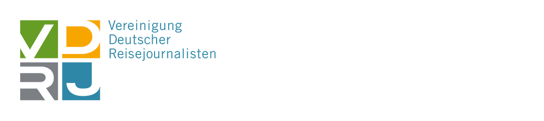 Logo der Vereinigung Deutscher Reisejournalisten